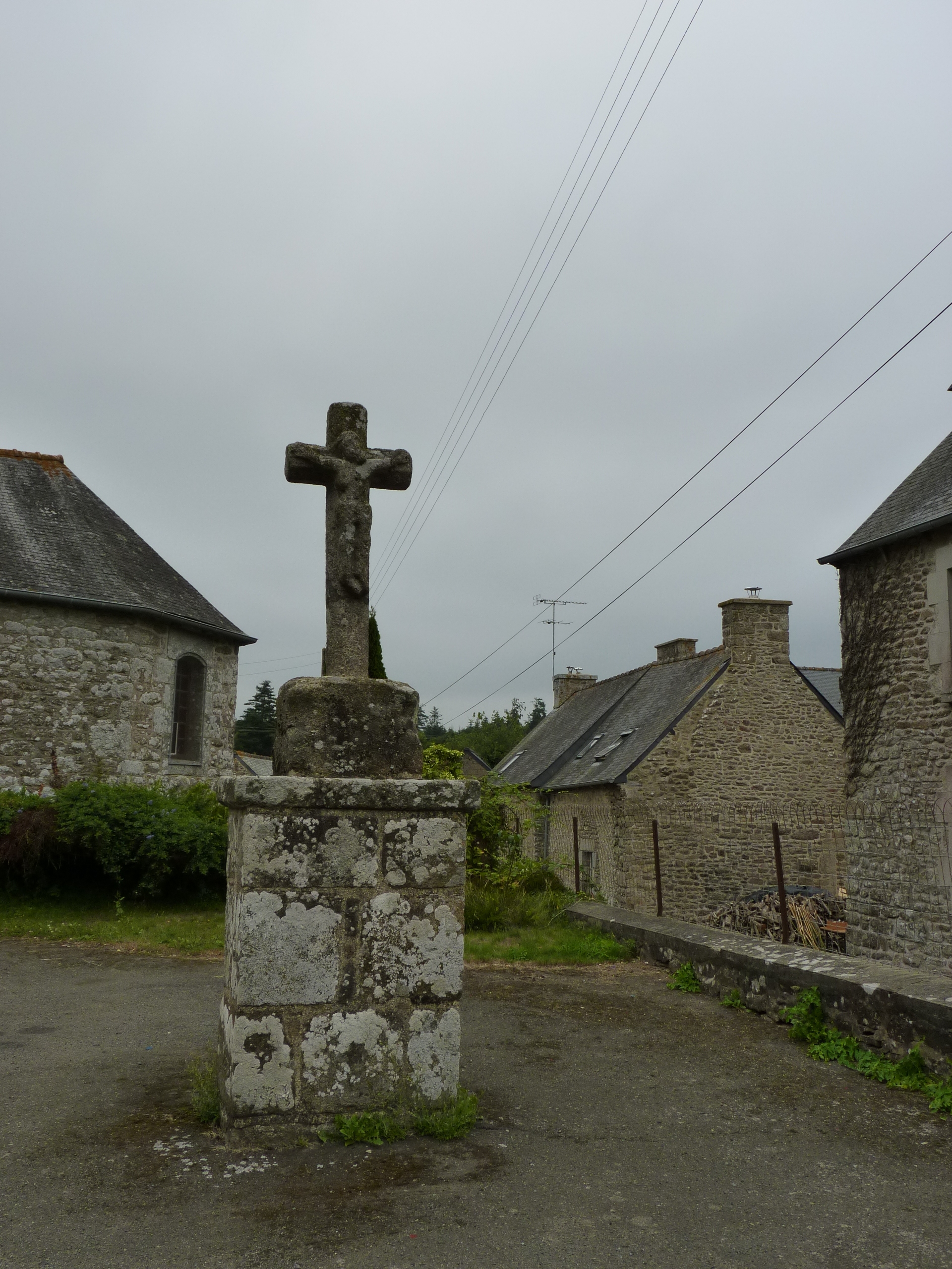 Croix du 18ème siècle